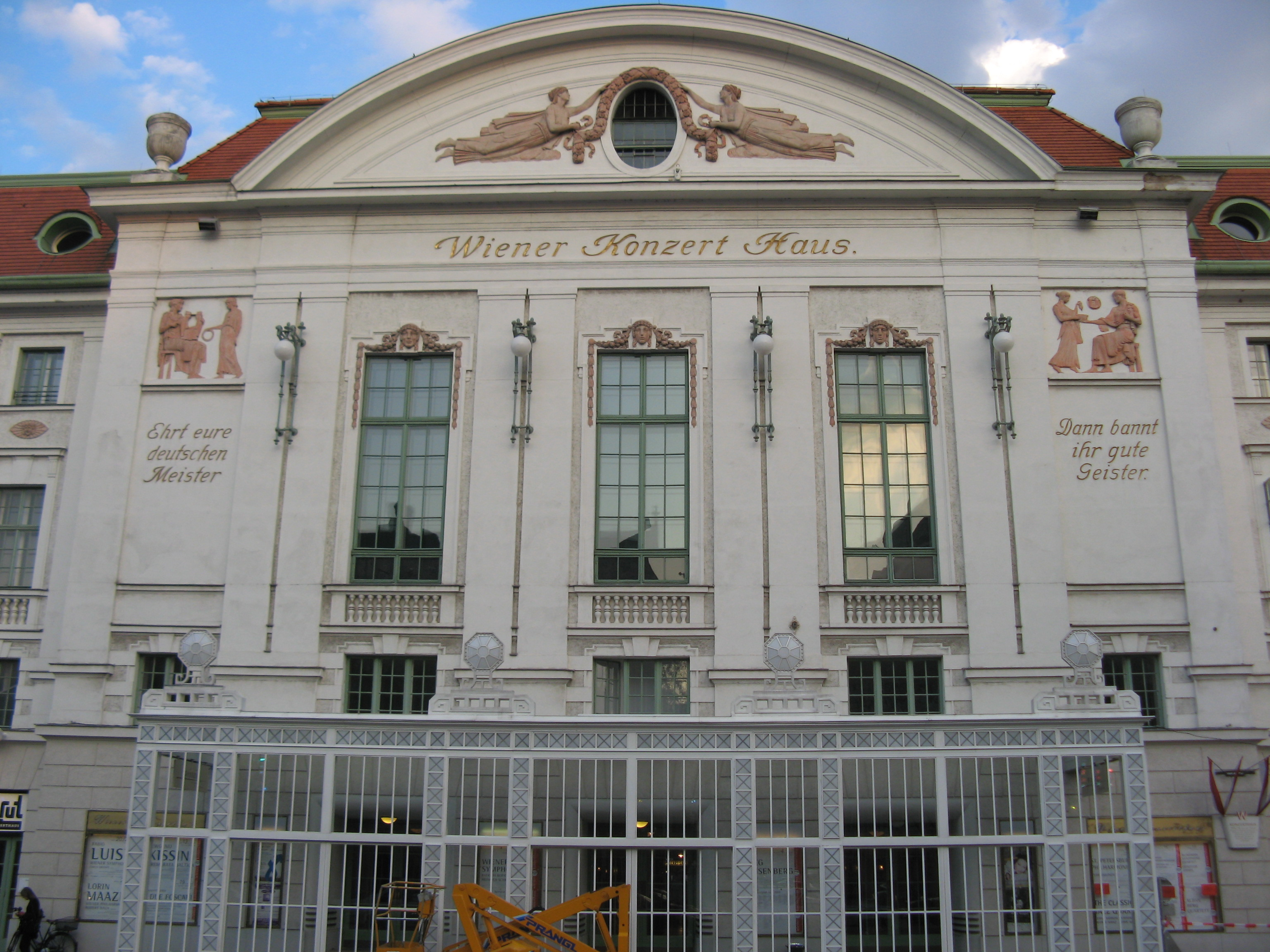 Konzert (1912-13) von Fellner & Helmer, Wien-Landstraße